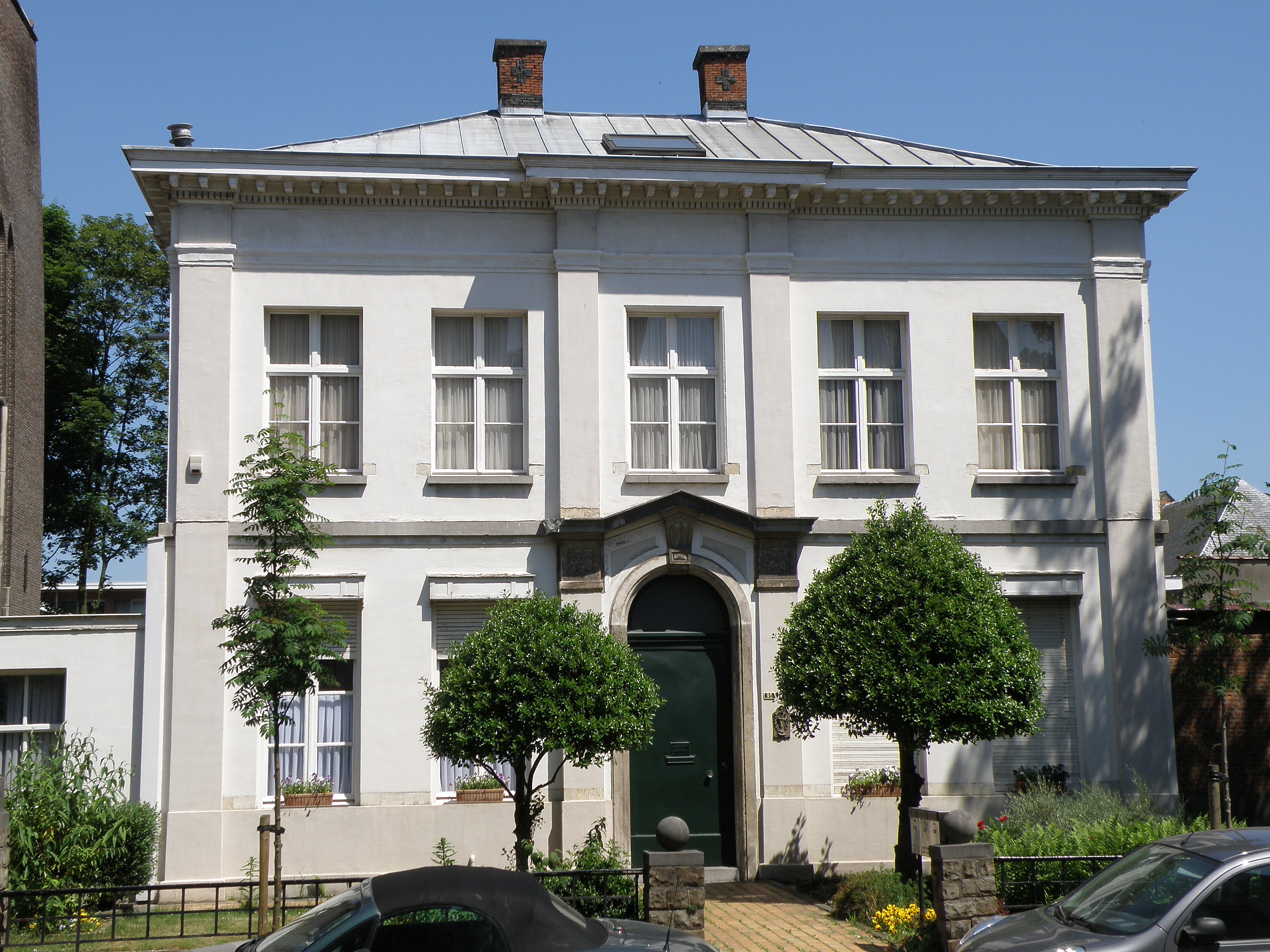 Anvers, Belgique. Presbytère de l'église Saint-Laurent, sis Markgravelei. Œuvre de Pierre Bruno Bourla.